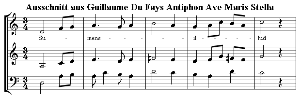 Beschreibung: Ausschnitt aus Guillaume Du Fays Antiphon Ave Maris Stella Quelle: Guillaume Du Fays, in moderner Notation von Boris Fernbacher Fotograf / Zeichner: Boris Fernbacher 09:42, 21. Feb 2006 (CET) Andere Versionen: Lizenz des Notenbilds Kurzauszug zitiert nach Zitatrecht.